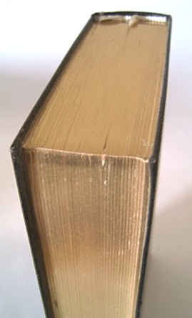 Buchrücken mit dreiseitigem Goldschnitt